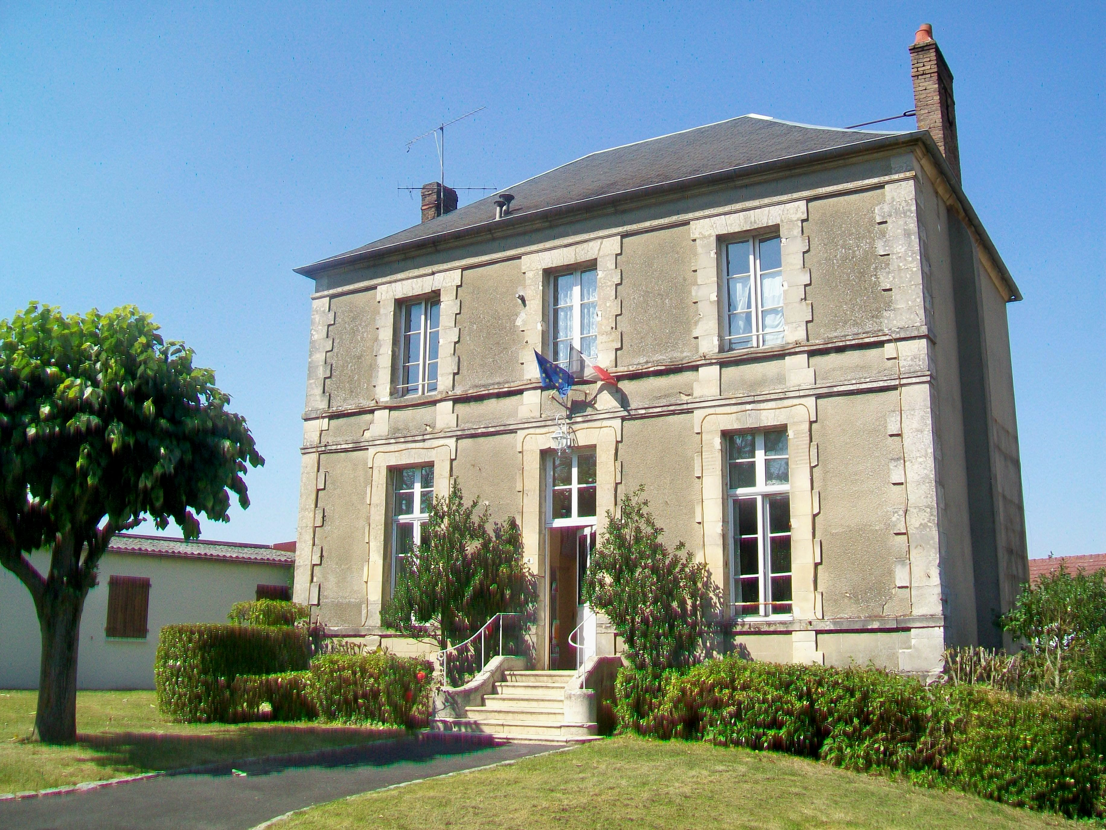 La mairie, rue de la fontaine d'Ascot.